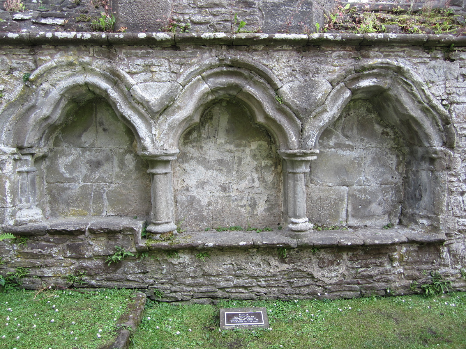 Inchmahome Priory, Lake of Menteith - Scozia